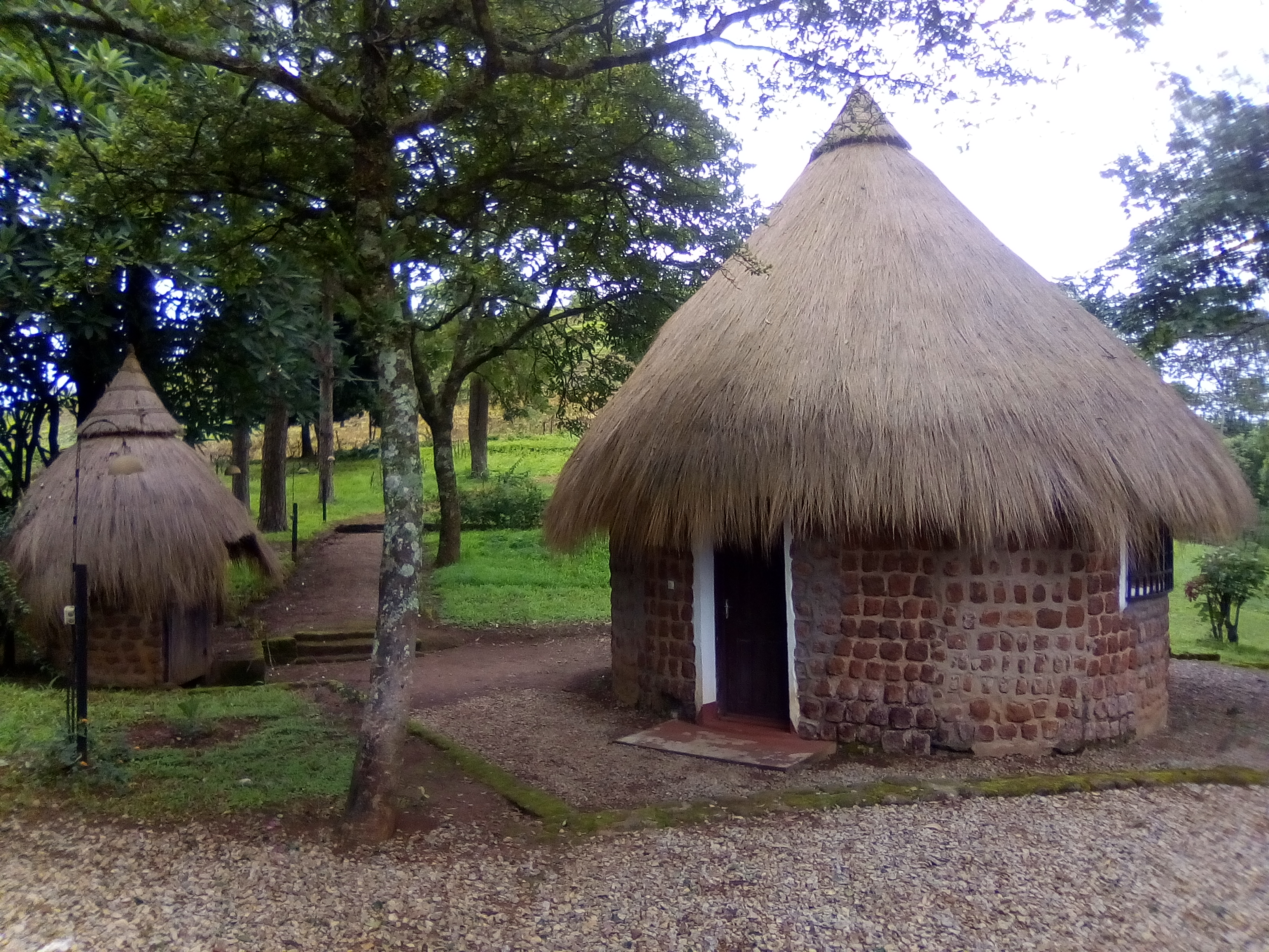 Boukarou du Ranch de Ngaoundaba, Ngaoundaba, région de l'Adamoua, Cameroun